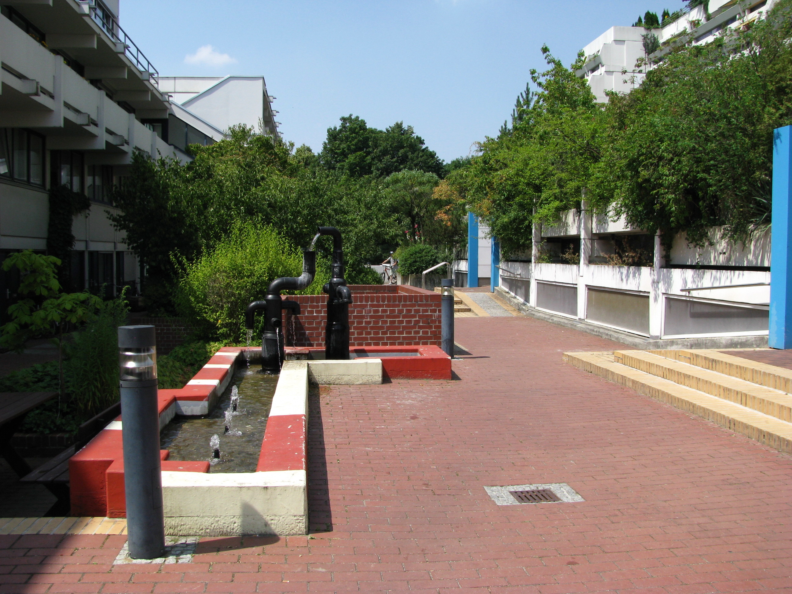 Connollystraße mit einer Brunnenanlage